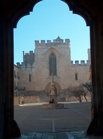 La plaza de San Bernardo vista desde el Arco Real del Monasterio de Santes Creus